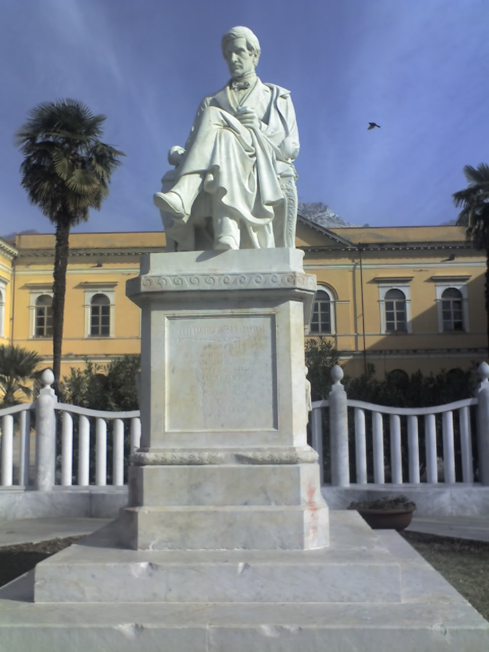 Carrara - Monumento a Pellegrino Rossi